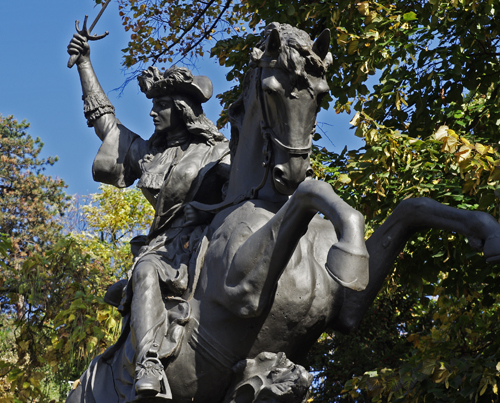 Statue implantée au jardin des Dauphins à Grenoble